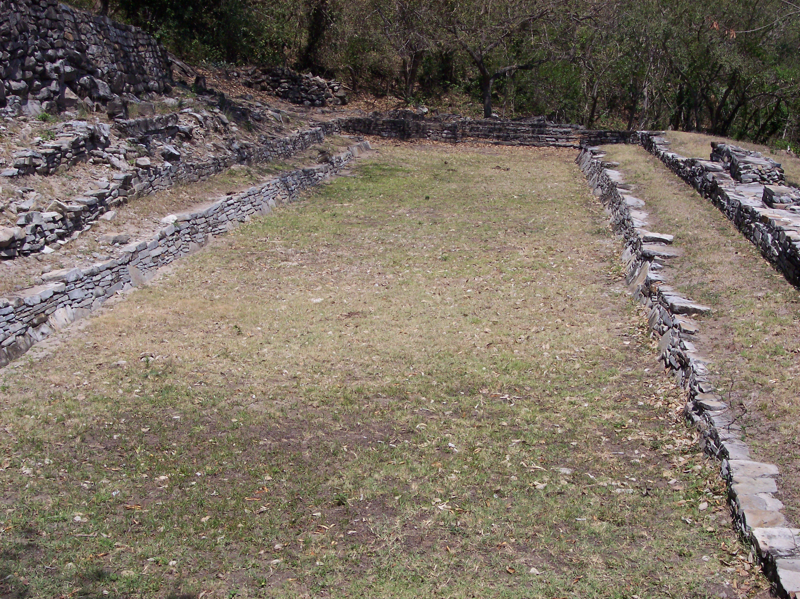 Ancient Ball game yard Note: Details about the photo are pending. SPANISH: Cancha de Juego de pelota Archeological Site Quiahuiztlan. Located in the Actopan Municipality, Estate of Veracruz, Mexico. SPANISH: Sitio Arqueológico Quiahuiztlán, Localizado en el Municipio de Actopan, Estado de Veracruz, México.